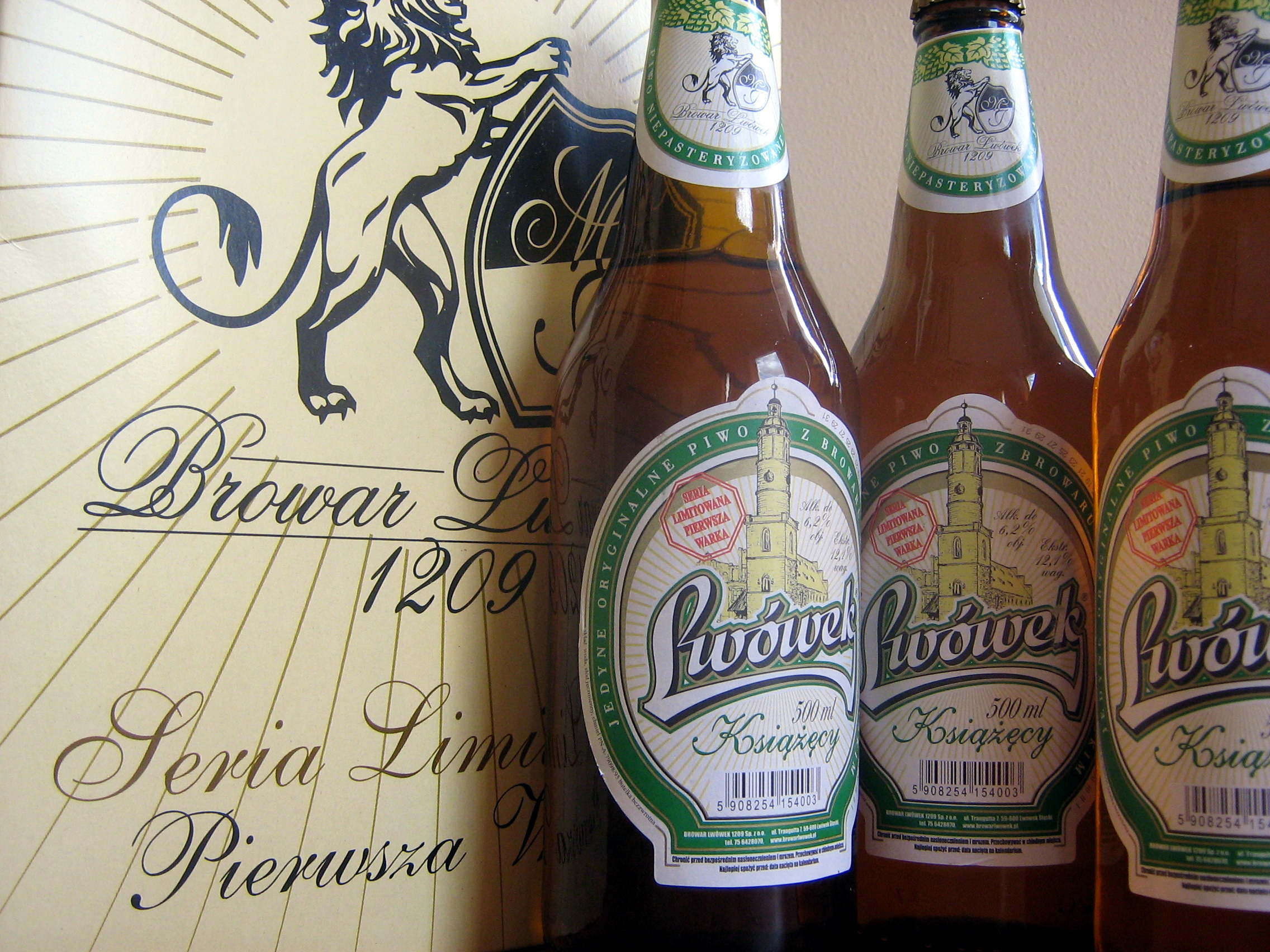 Piwo z Browaru Lwówek 1209 uwarzone 20 maja 2010 r.